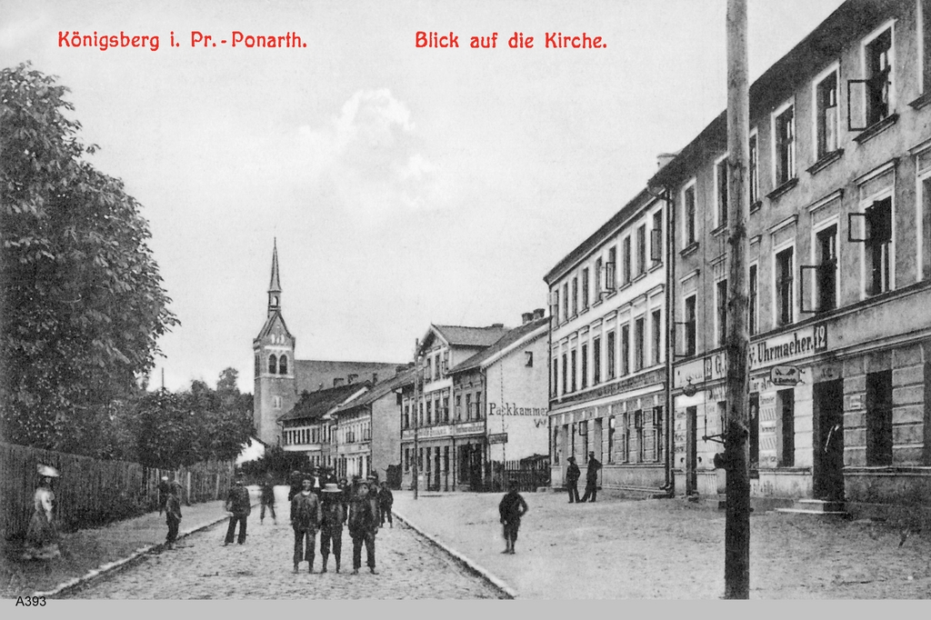 Die Krirche in Ponrath